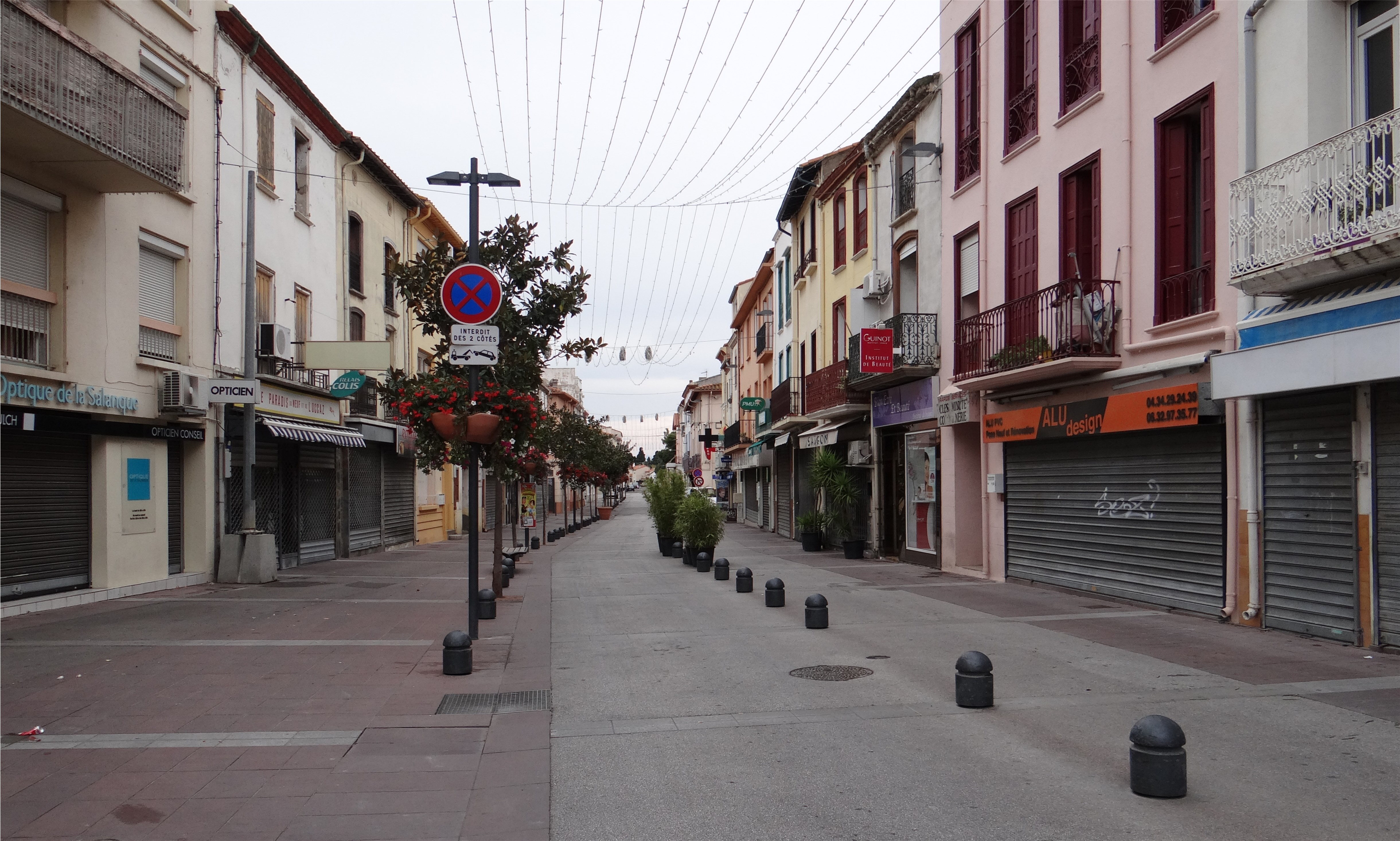 Rue Arago, Saint-Laurent-de-la-Salanque, Pyrénées-Orientales, France.